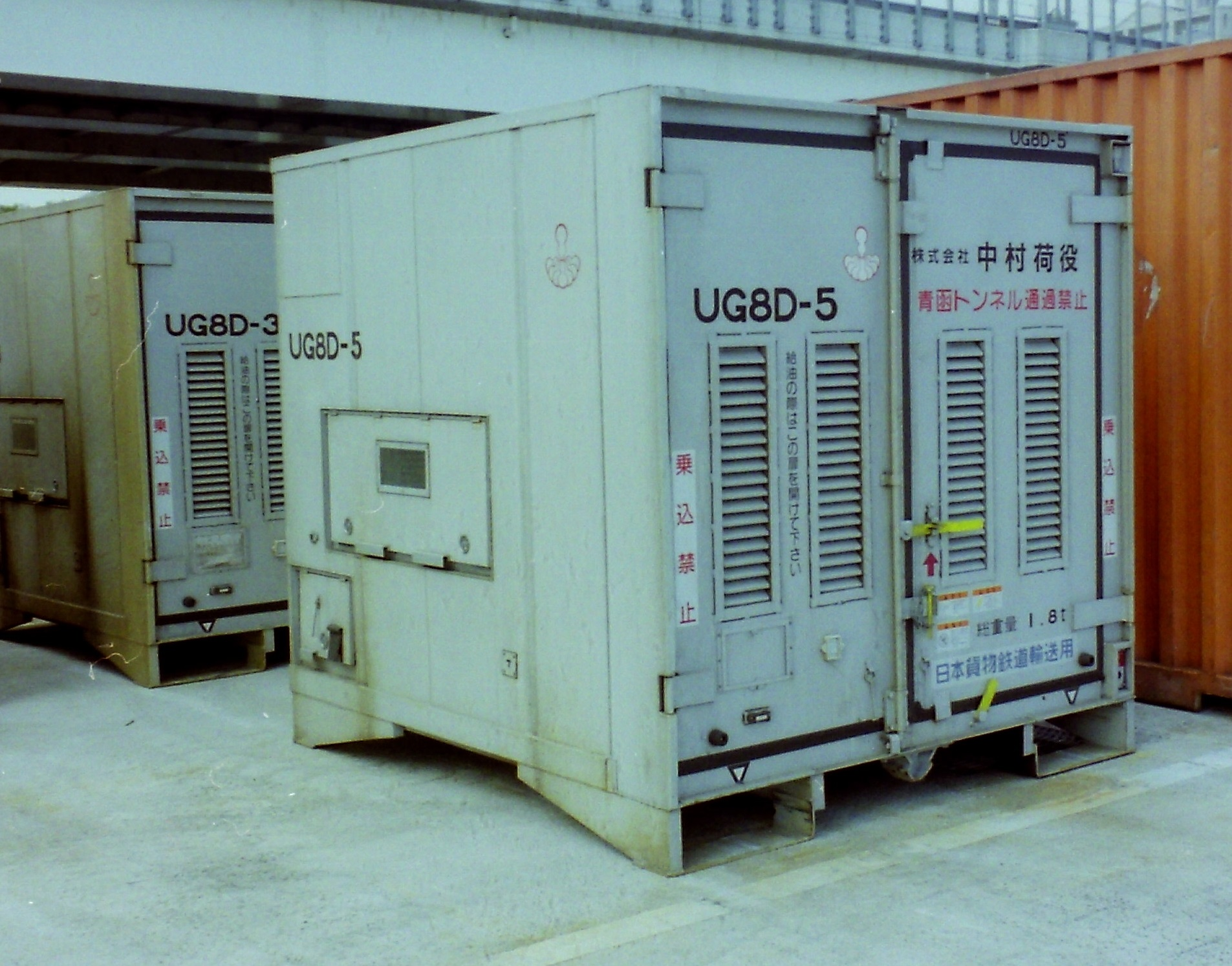 撮影地＝【神奈川／本牧貨物駅】